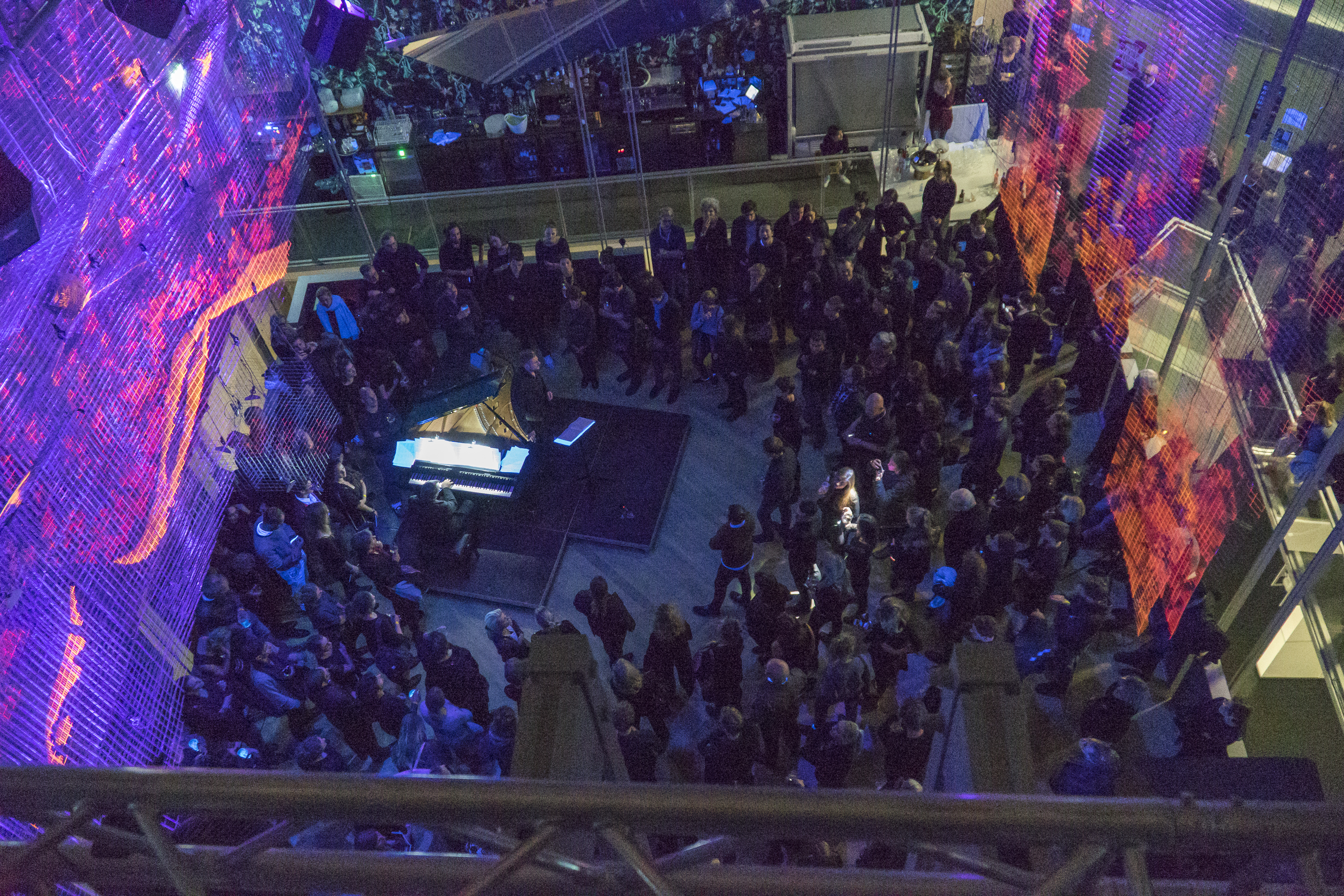 Die Raum-Klang-Installation "Orplid" am 10. November 2017 im Hotel Lovelace - das Pilotprojekt des HIDALGO Festival München. Zwischen den Schwarzlicht-Installationen traten Sänger Ludwig Mittelhammer und Pianist Eric Schneider auf mit Werken von Franz Schubert und Hugo Wolf auf.